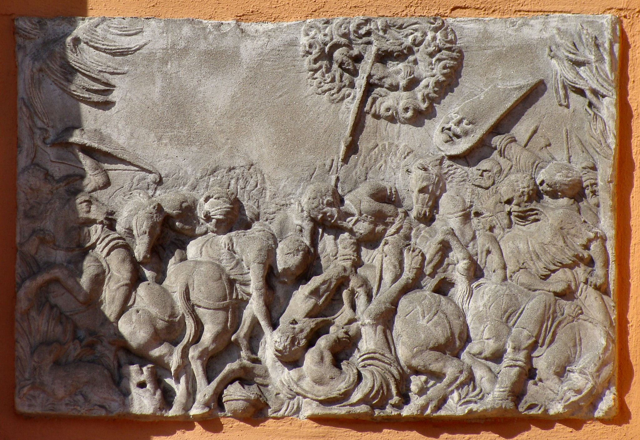 Kopia płaskorzeźby "Nawrócenie św. Pawła" - Kamienica Loitzów w Szczecinie